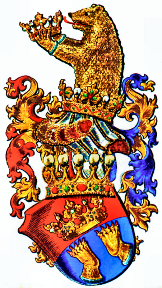 Korrigiertes, fälschlich mit 7 Zacken als freiherrlich dargestelltes Wappen der Ritter von Flondor aus dem späten 19. Jh.